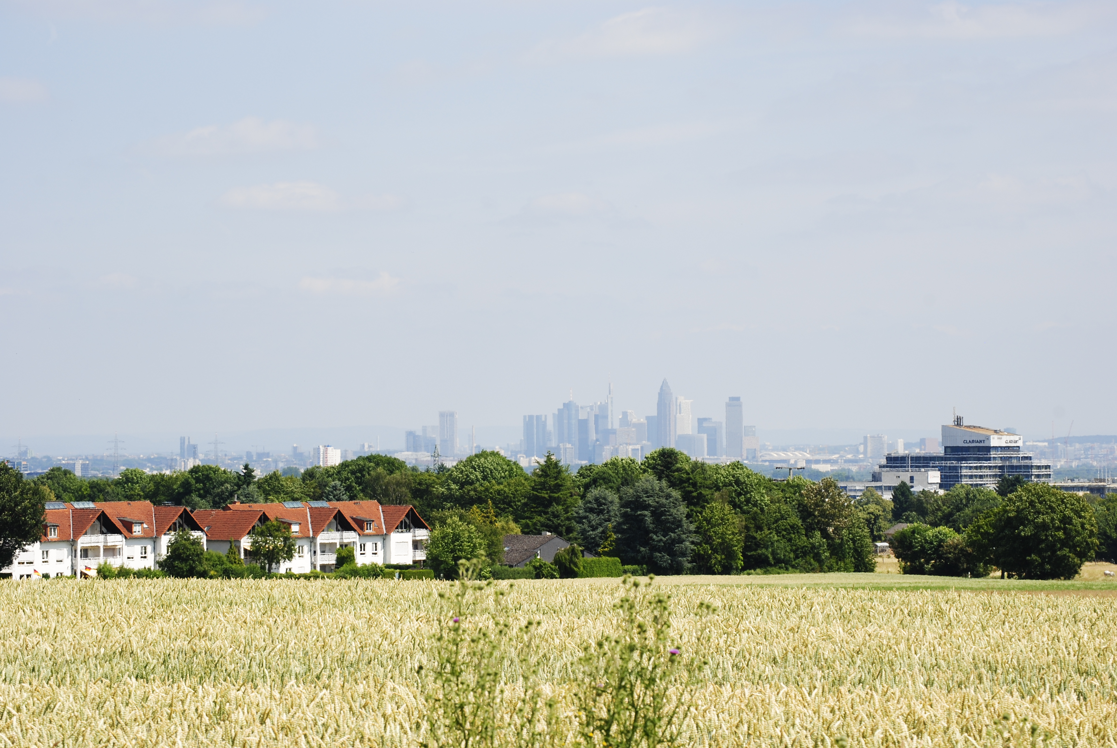 Blick auf die Frankfurter Skyline vom sinai